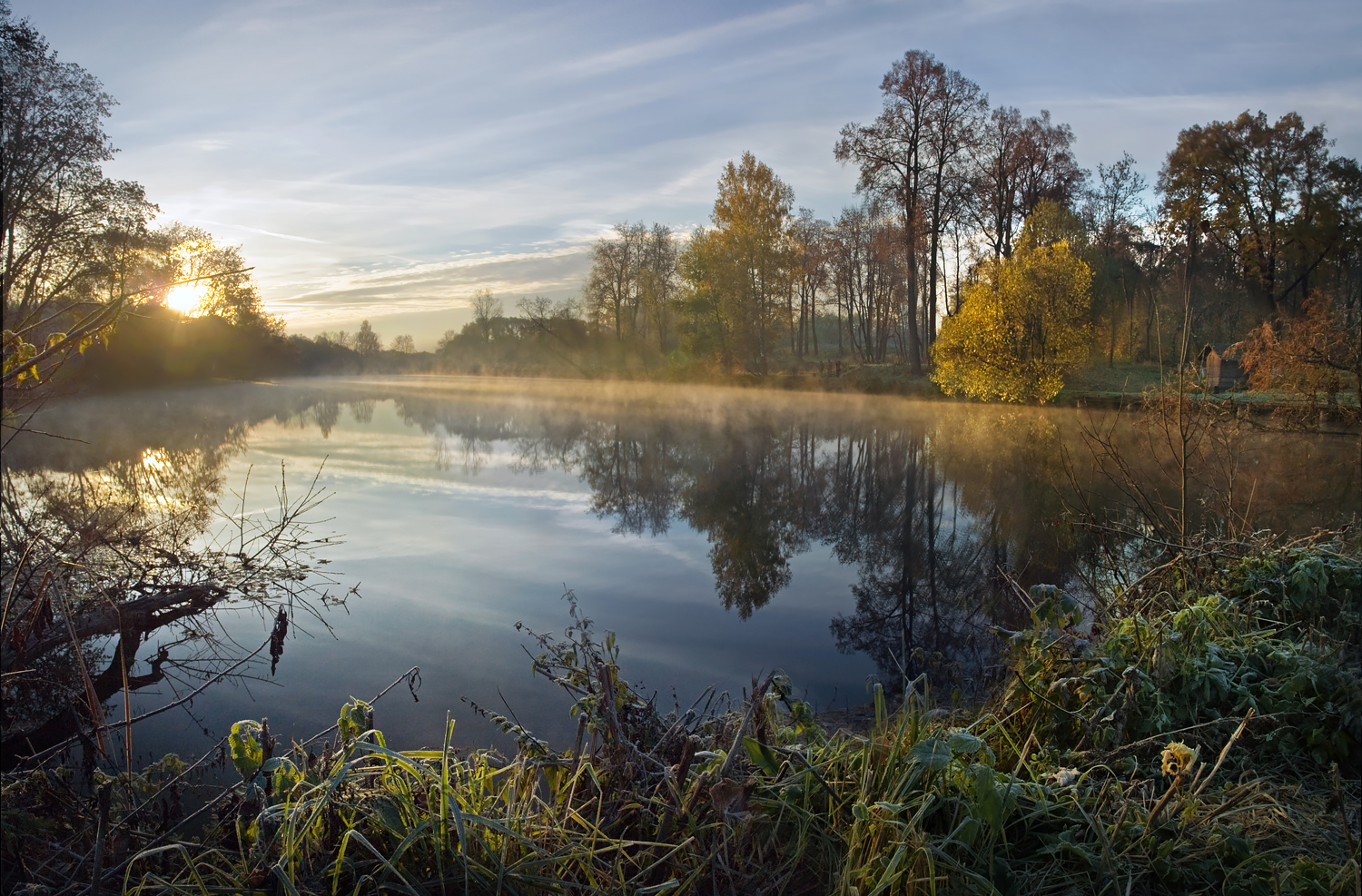 Парк с прудами: улица Пушкинская (пос. Лопасня), Чехов, Чеховский район, Московская область